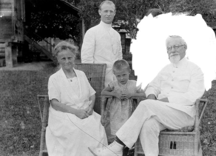 Repronegatief. Portret van zendeling Dr. A.C. Kruyt met familie in de tuin, Nederlands-Indië